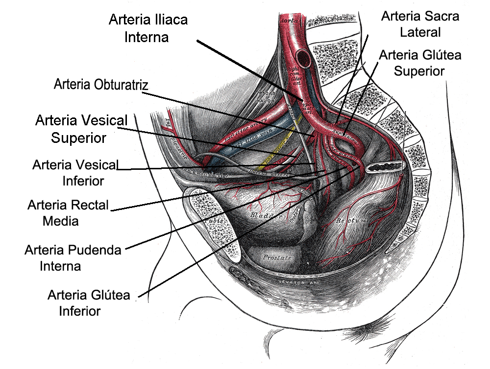 Arteria rectal media y otros